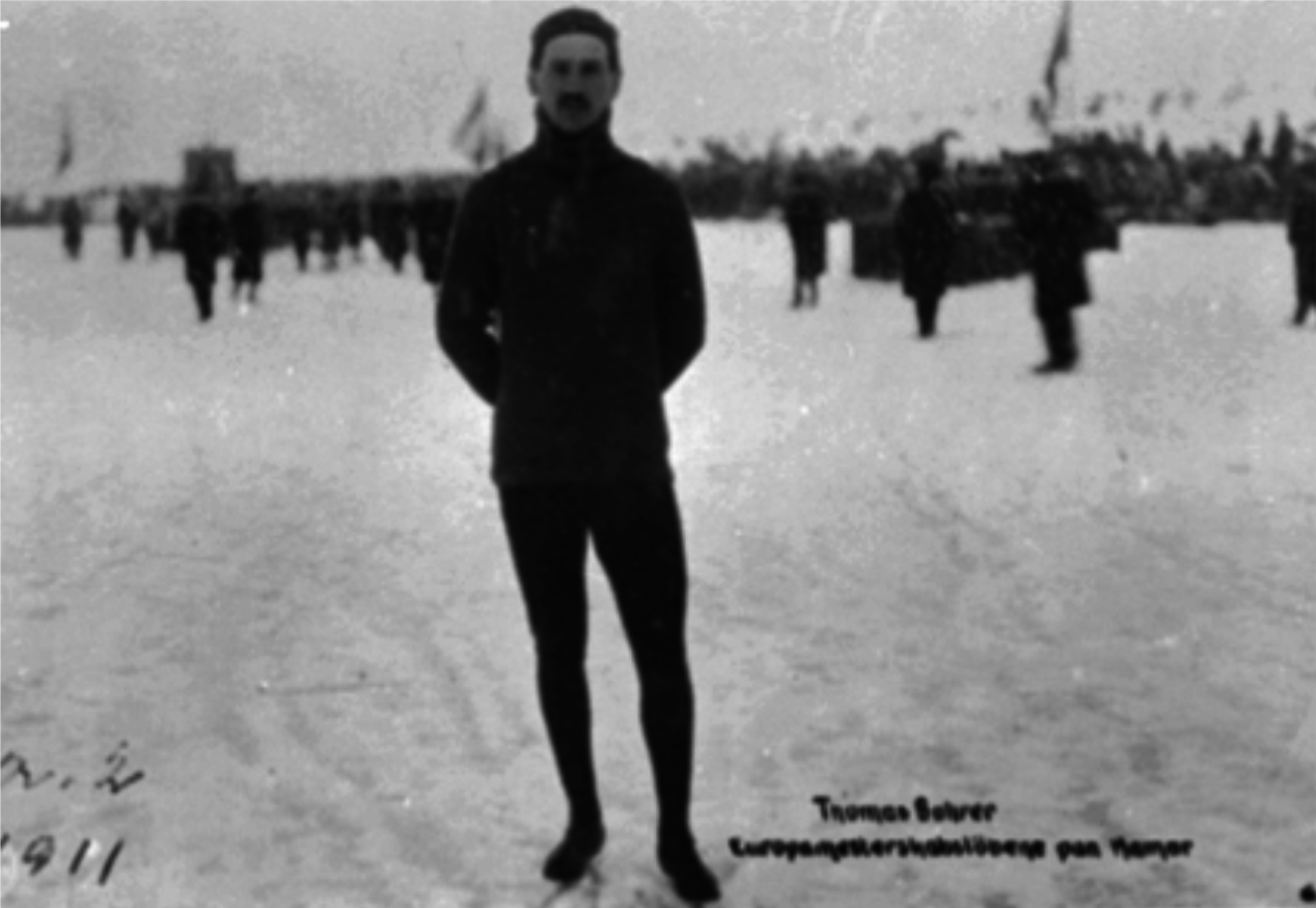 THOMAS BOHRER, SKØYTELØPER, MJØSISEN, TILLSKUERE. Se Idrett i Hamar gjennom 100 år. bilde nr. 73